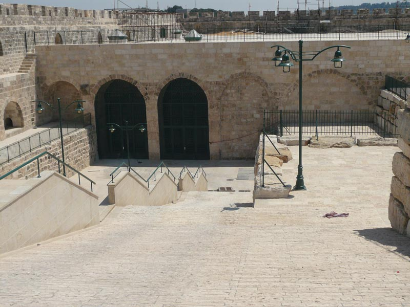 salomon stables